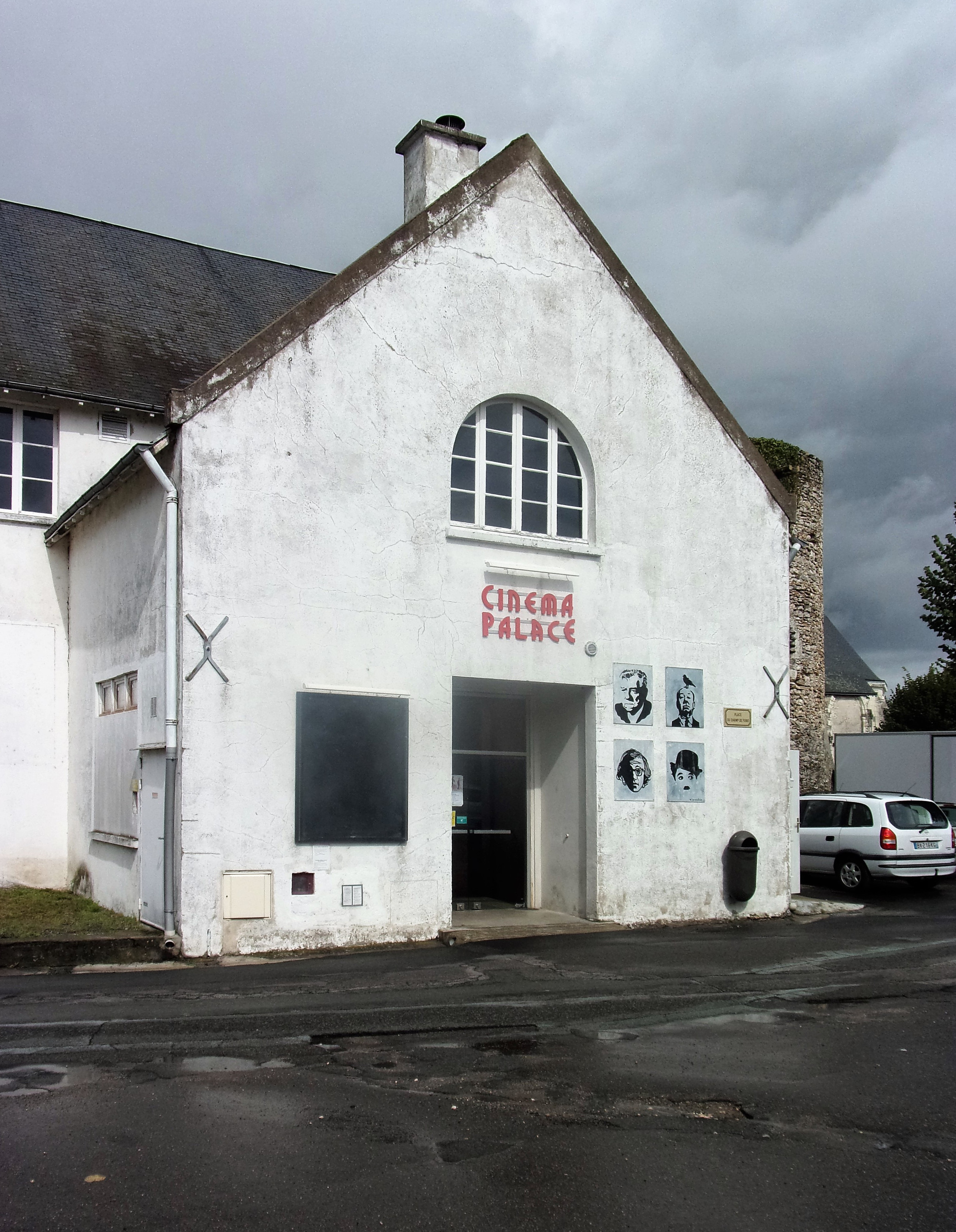 Salle des fêtes de Cormery